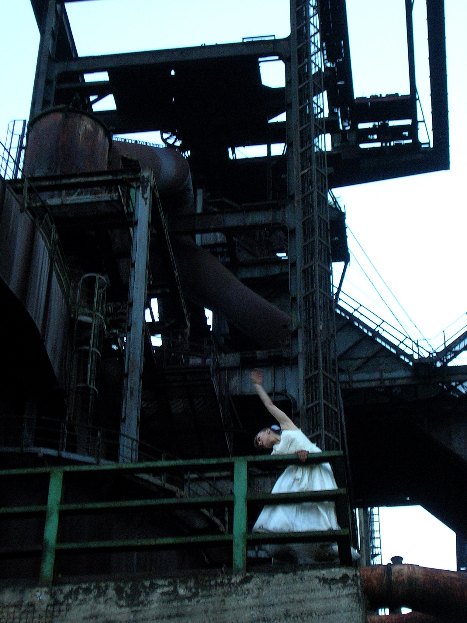 Dortmund, Hoesch Phoenix-West, Museumsnacht